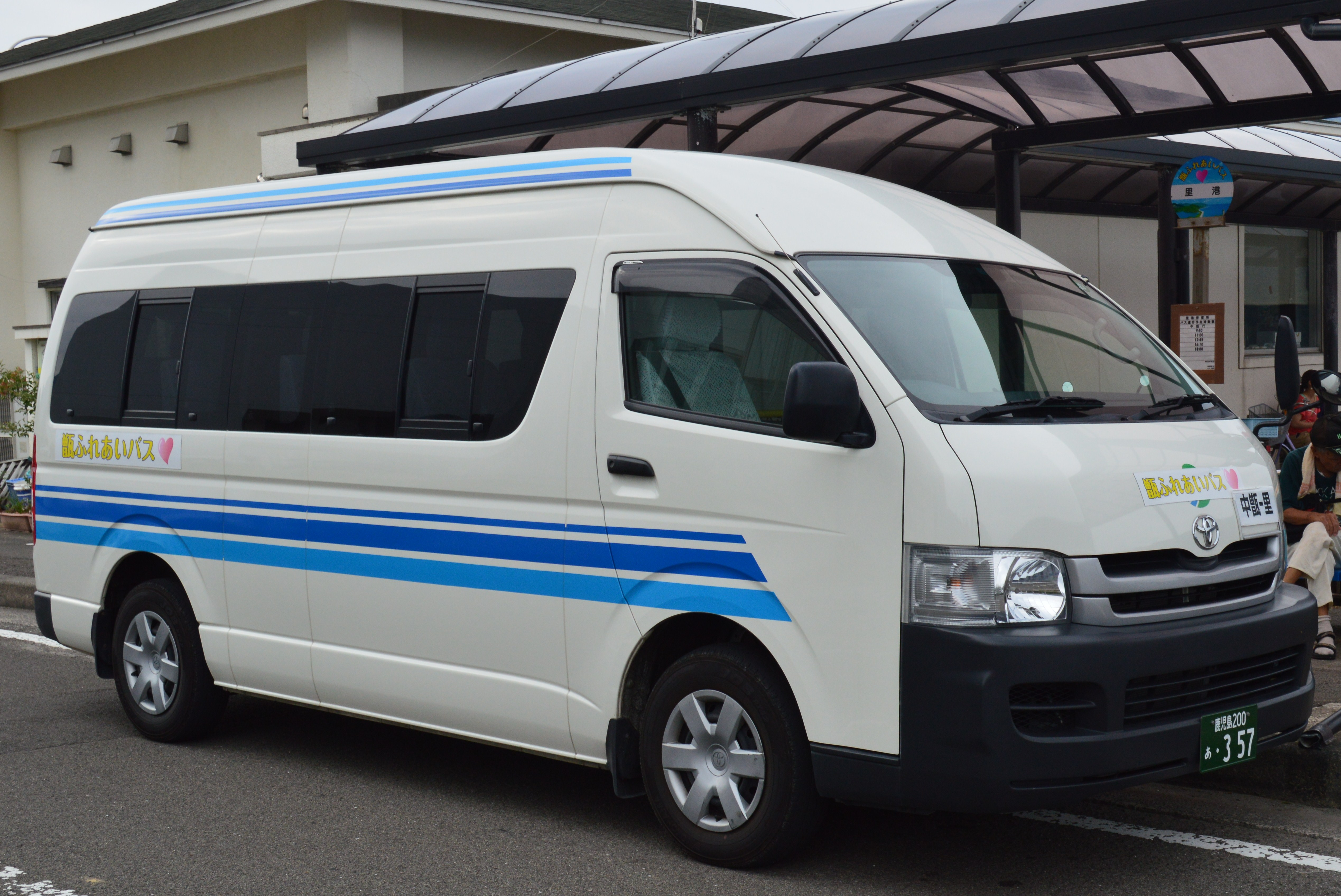 鹿児島県薩摩川内市の上甑島、コミュニティバスのふれあいバス